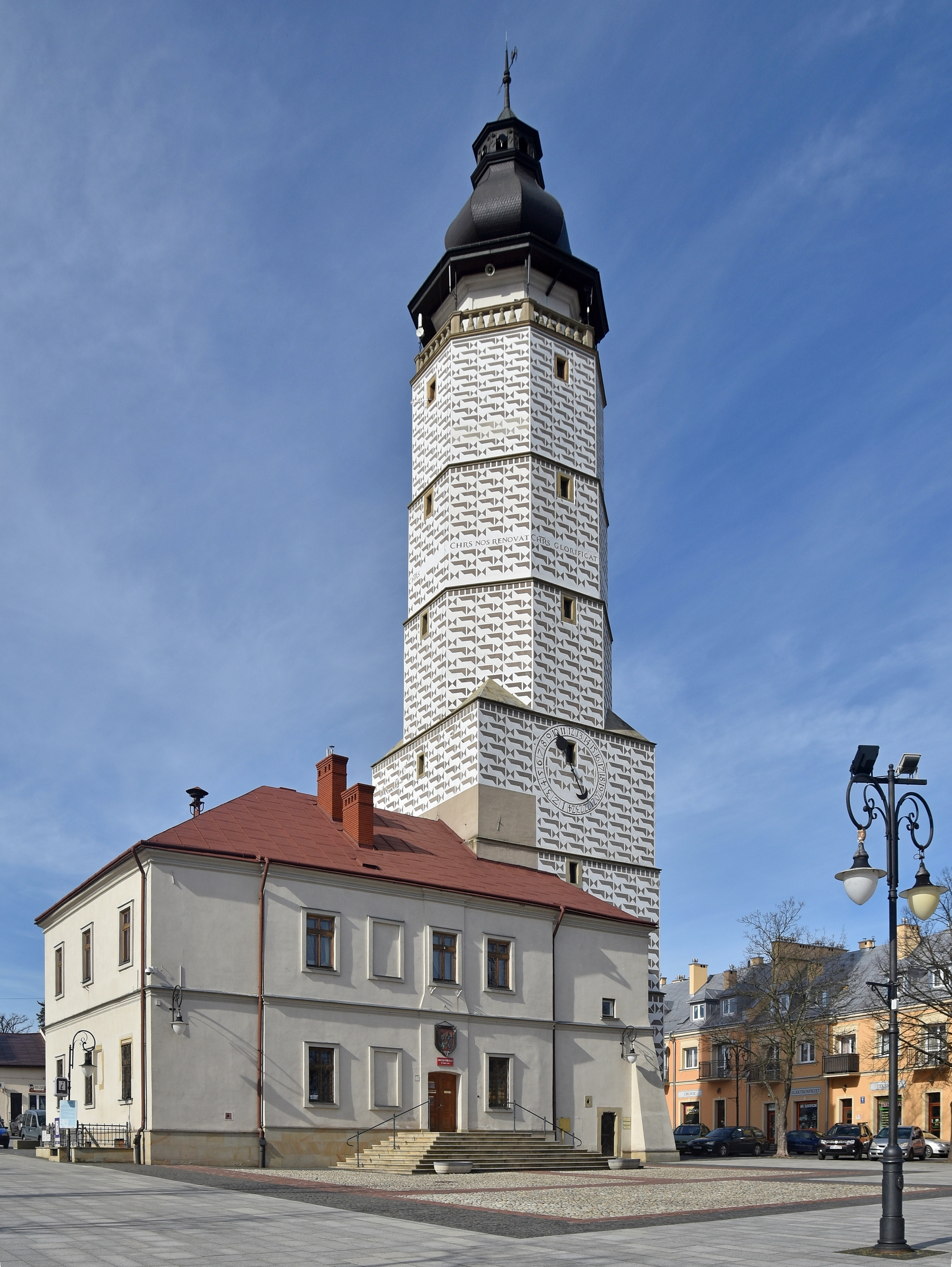 miasto Biecz